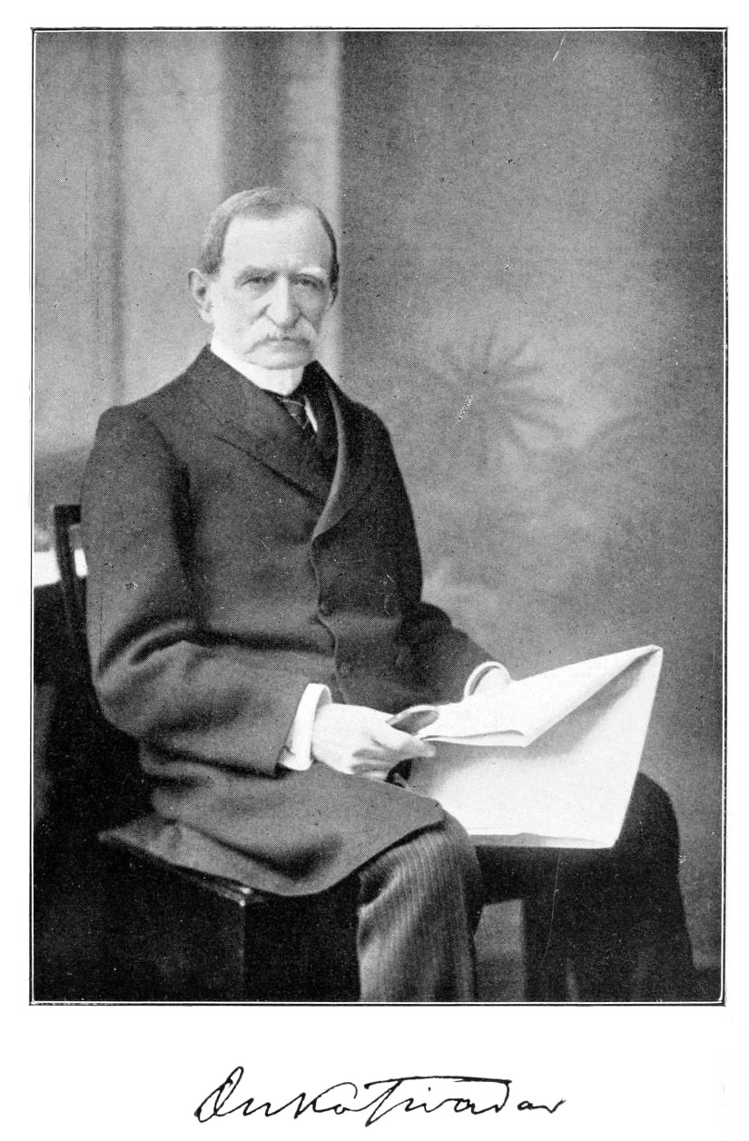 Theodore Duka (Tivadar Duka)(1825-1908)